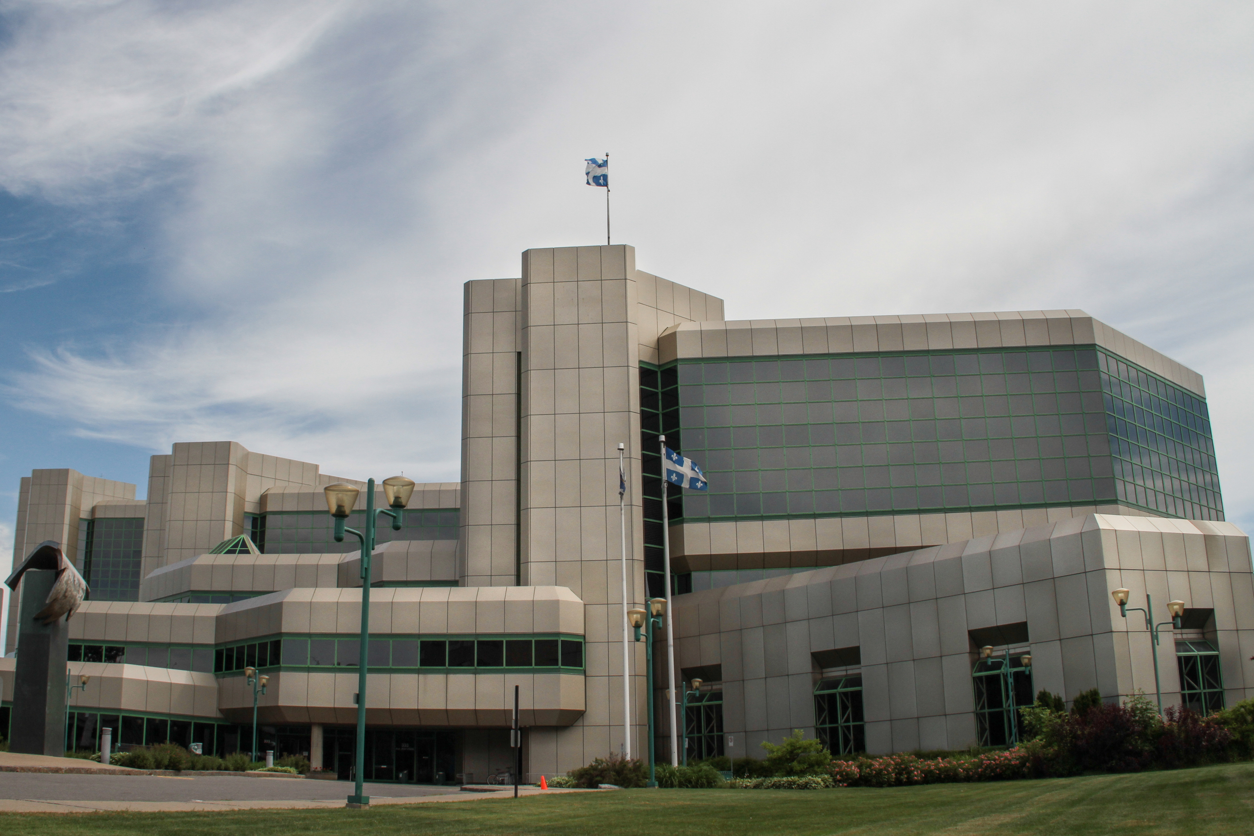 Siège social de la Société d'assurance-automobile du Québec, boulevard Jean-Lesage, dans l'arrondissement La Cité-Limoilou de la ville de Québec.